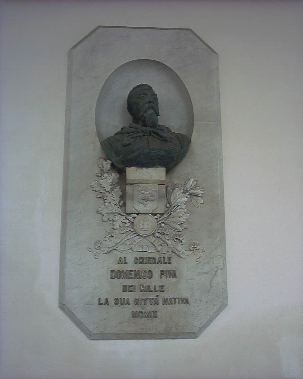 Mezzobusto di Domenico Piva di Augusto Sanavio, Gran Guardia, Rovigo.